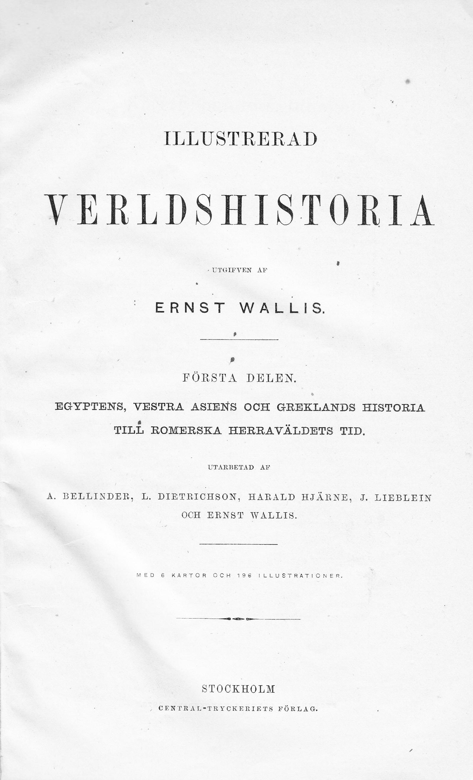 Illustrerad verldshistoria utgifven av E. Wallis. band I